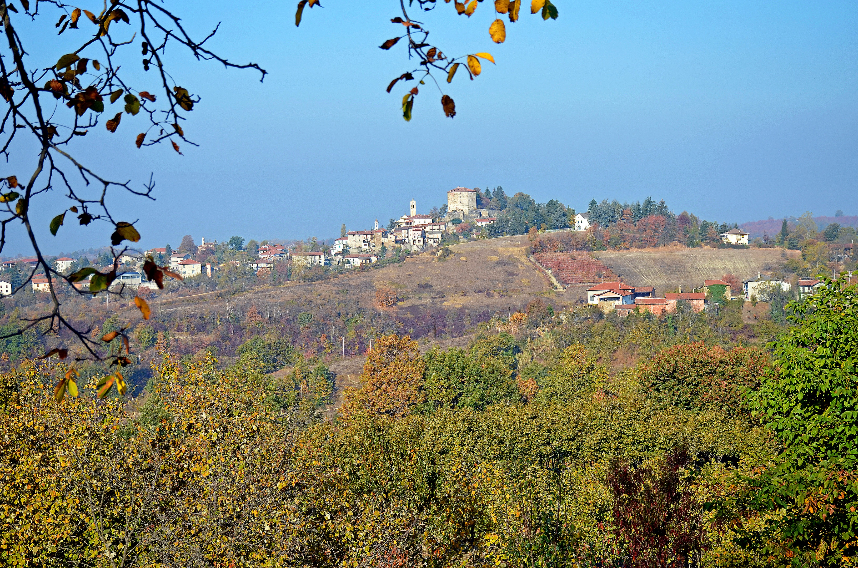 Marsaglia (Cuneo), veduta da case Voarini.